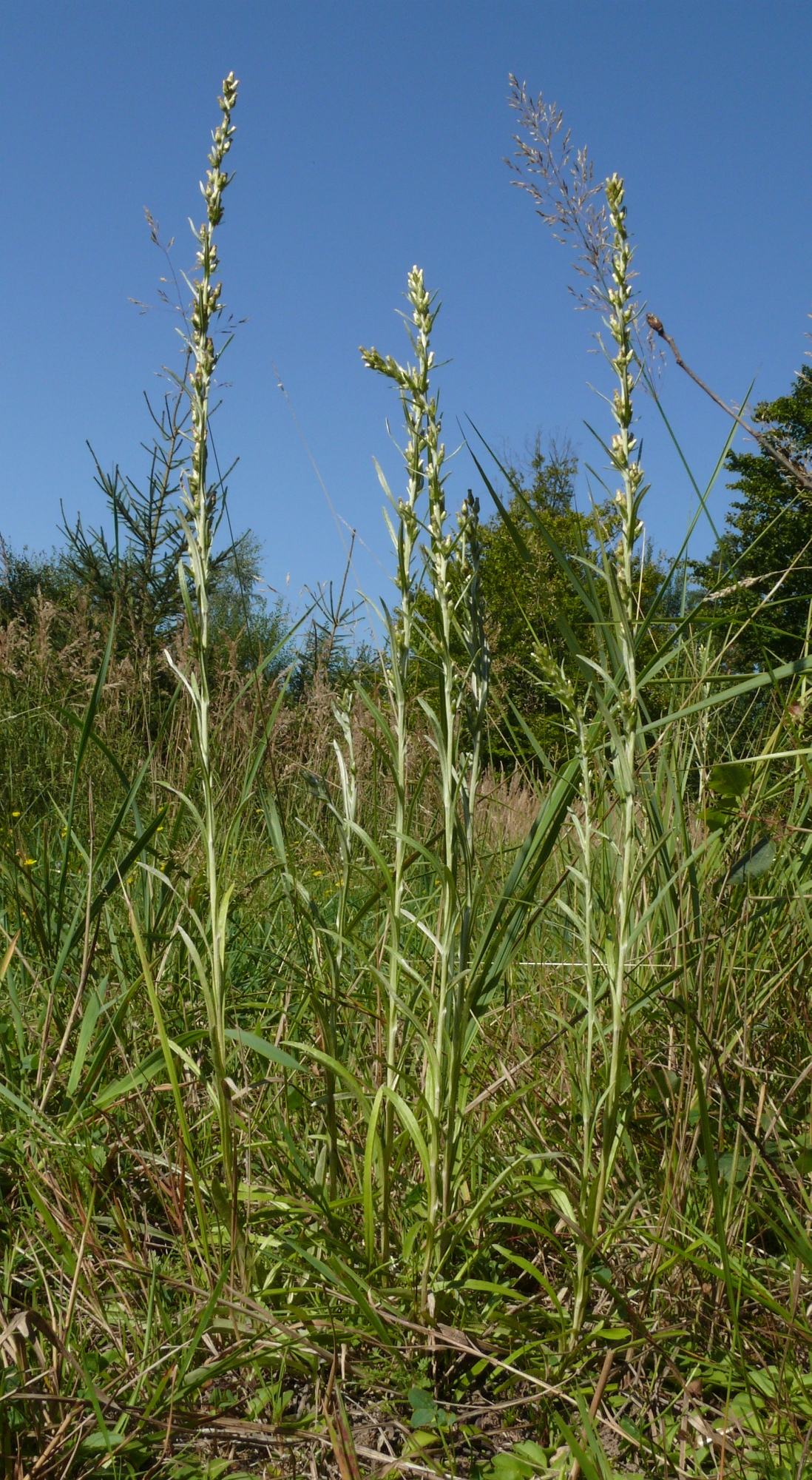 Gnaphalium sylvaticum, Schwäbisch-Fränkische Waldberge, Germany